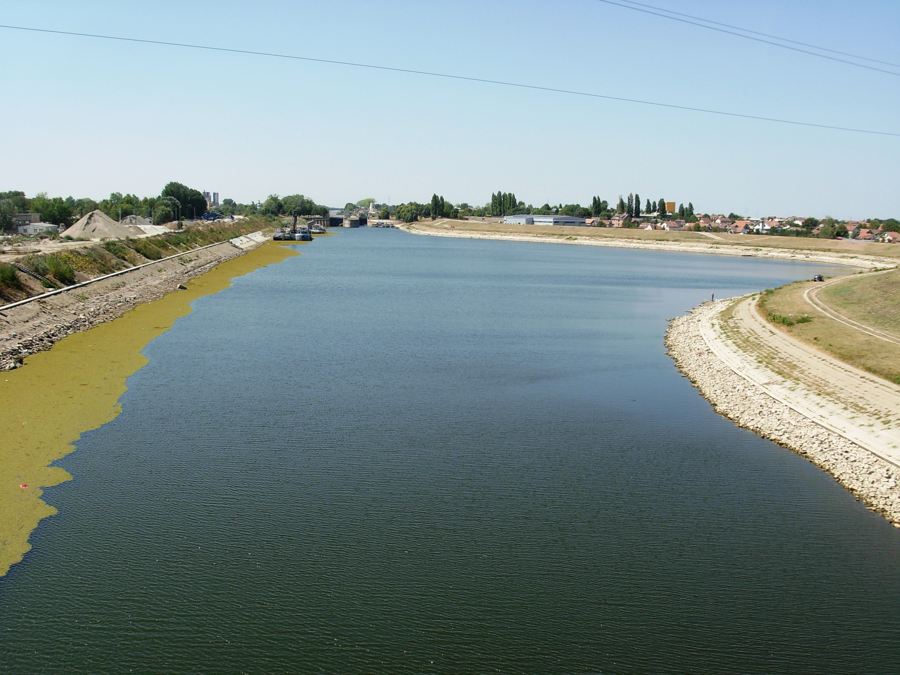 Prevodnica na kanalu DTD, avgust 2012.